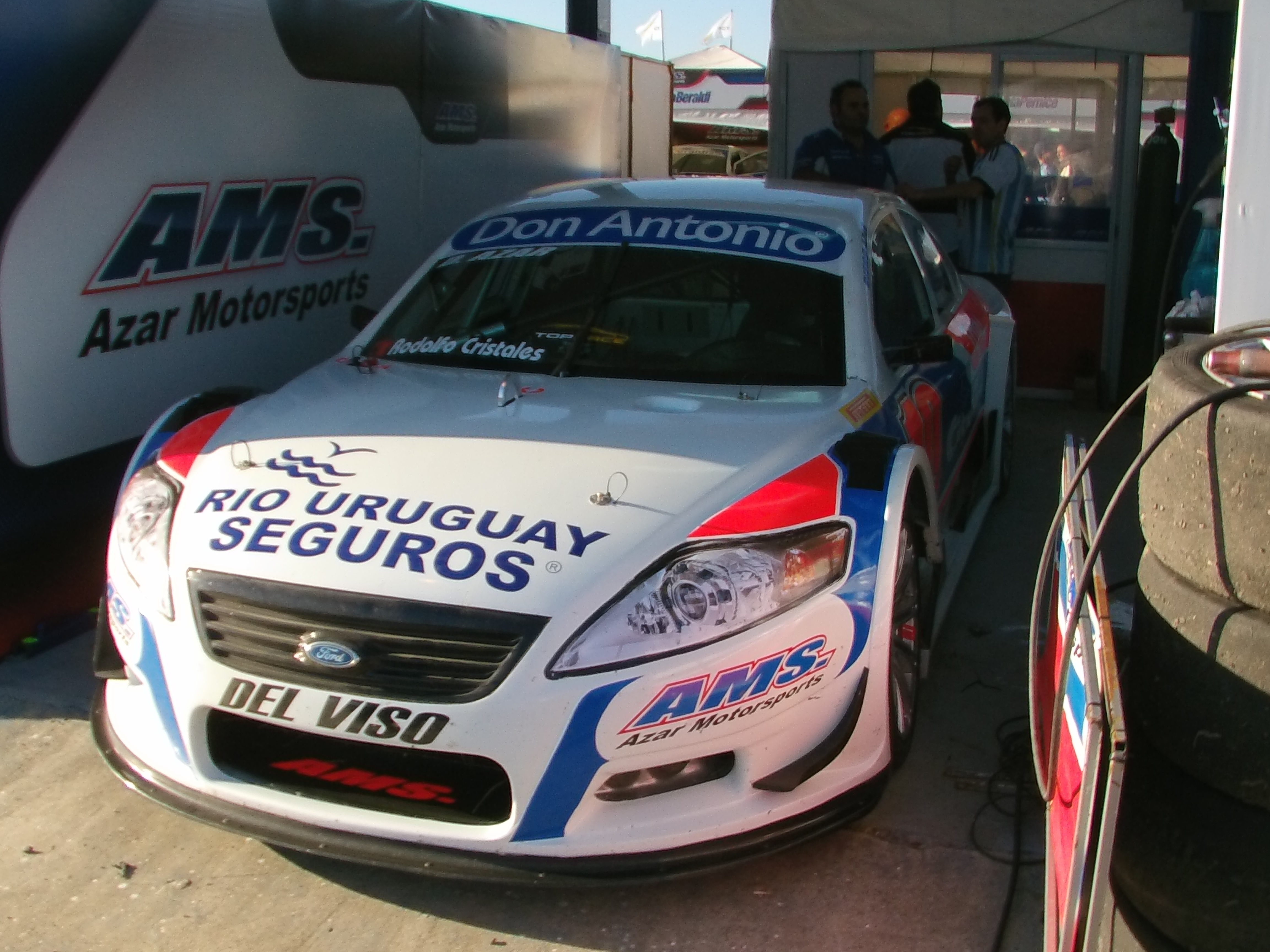 Unidad Ford Mondeo III del equipo Azar Motorsport, de la categoría argentina de automovilismo Top Race V6